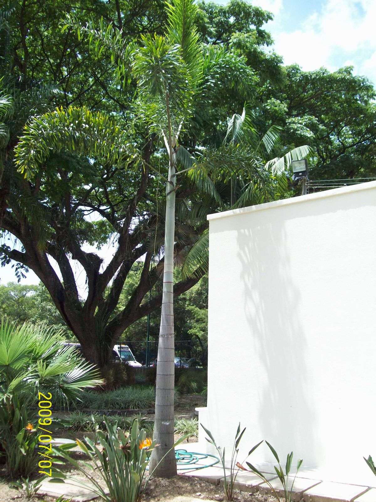 Wodyetia bifurcata en Jardín Botánico de Caracas